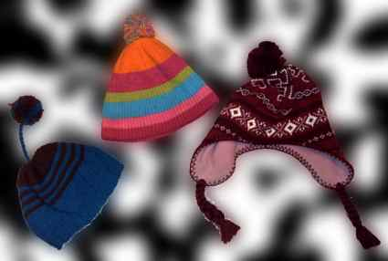 DreiPudelmützen